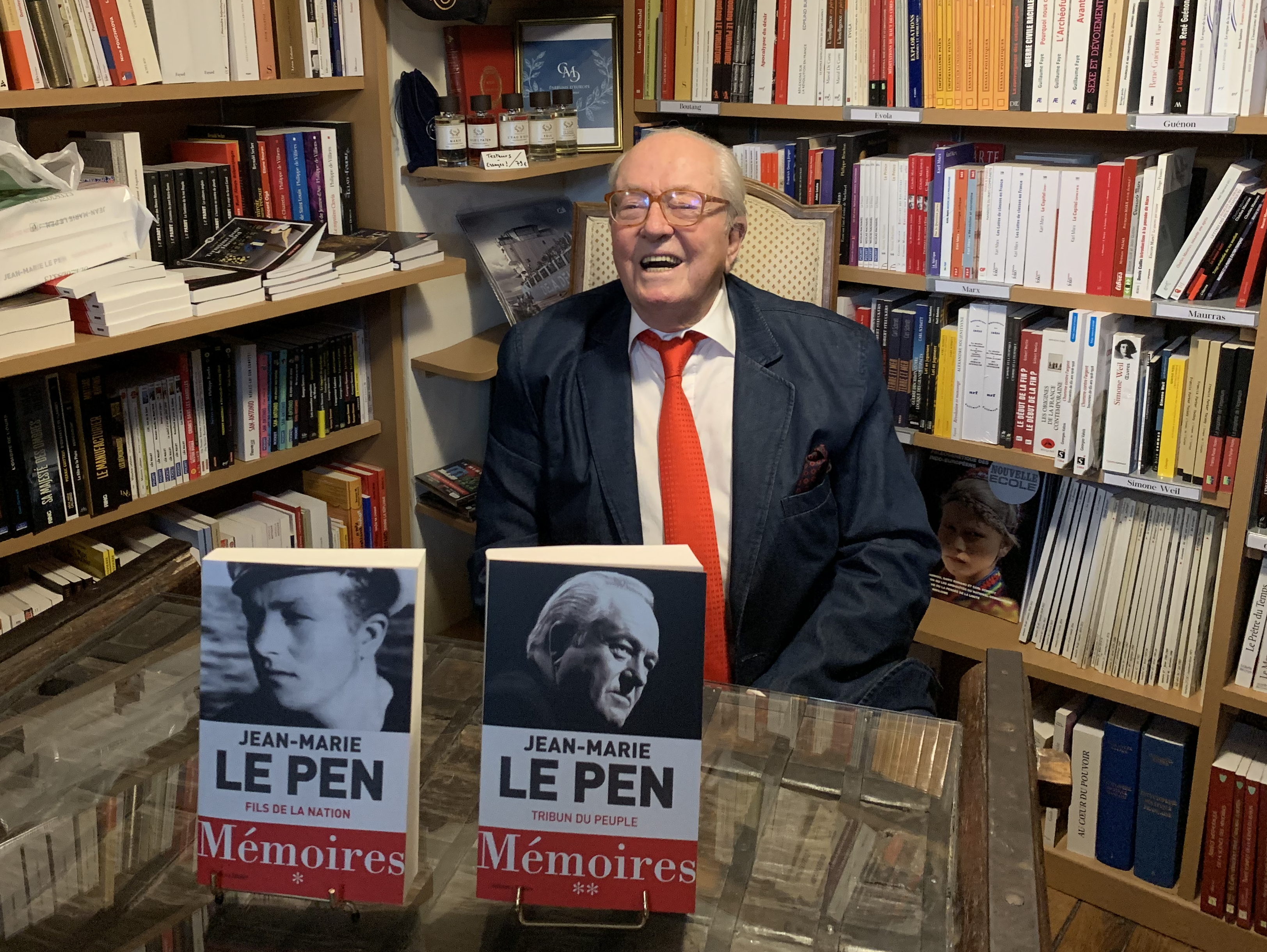 Jean-Marie Le Pen à une séance de dédicaces du tome 2 de ses Mémoires, à La Nouvelle Librairie (Paris, Quartier latin).